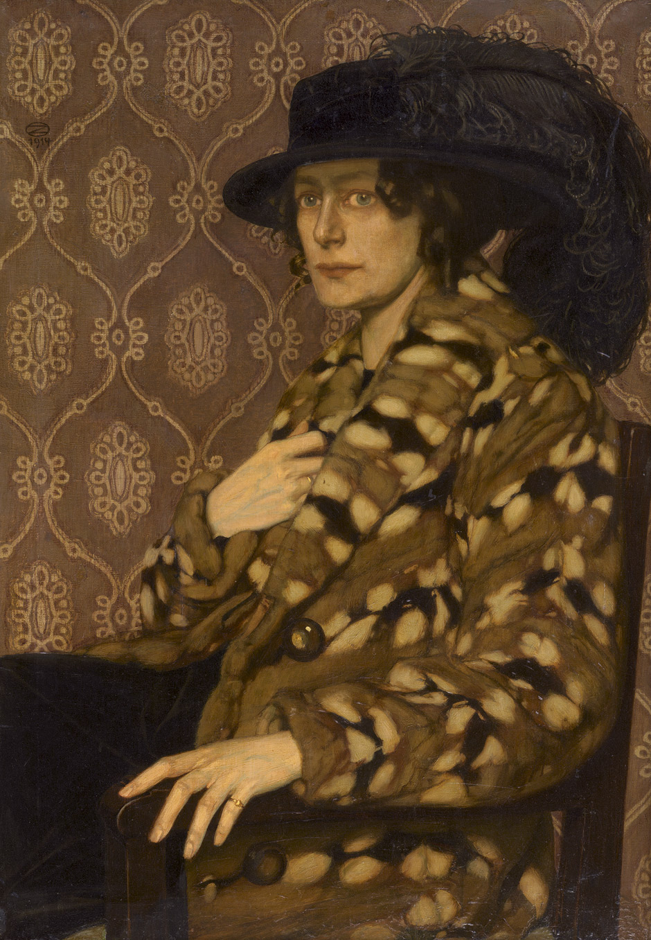 Oskar Zwintscher: Bildnis der Adele Zwintscher im Hamsterpelz (1914). The Jack Daulton Collection, Los Altos Hills, California